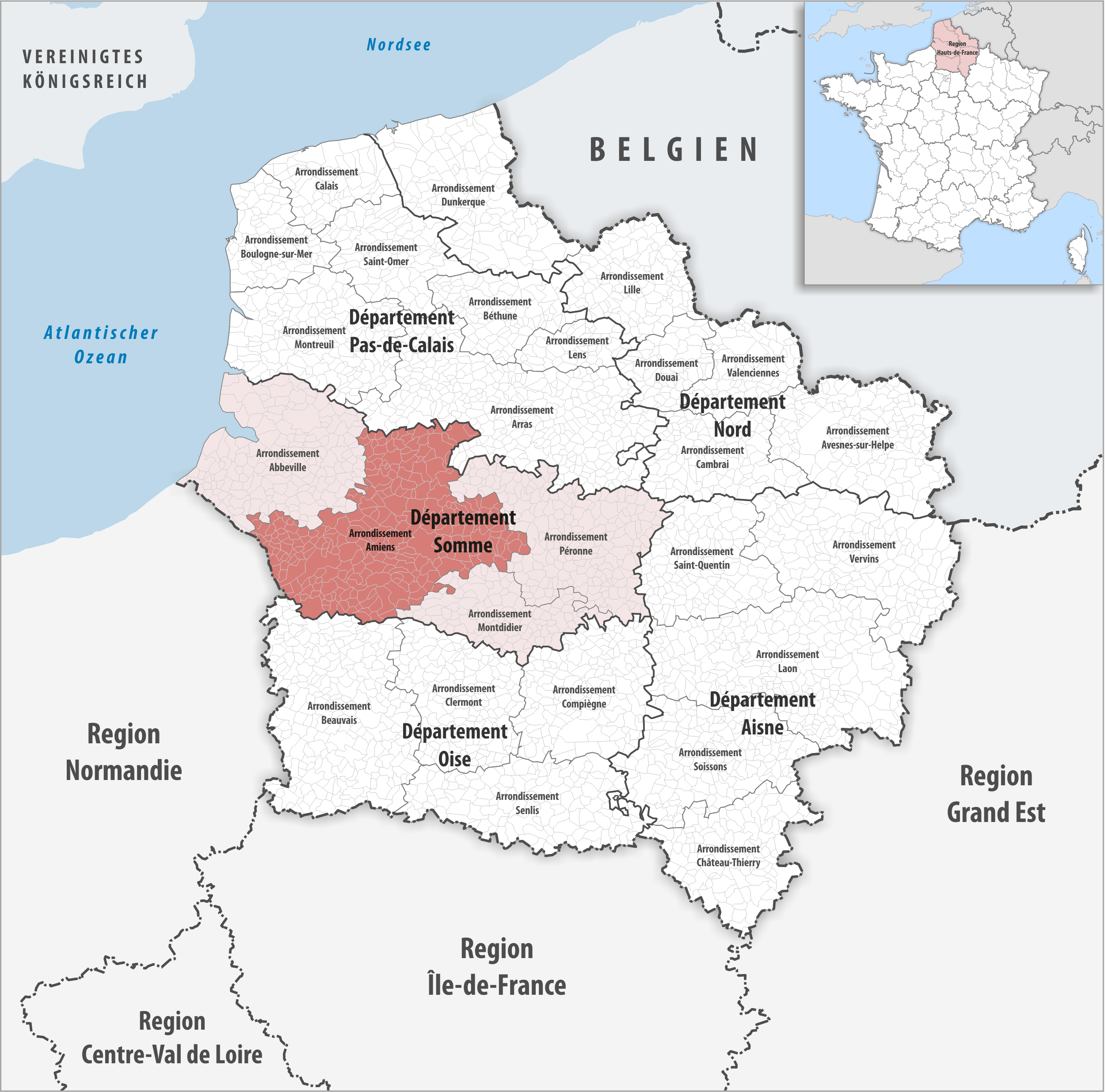 Lage des Arrondissements Amiens